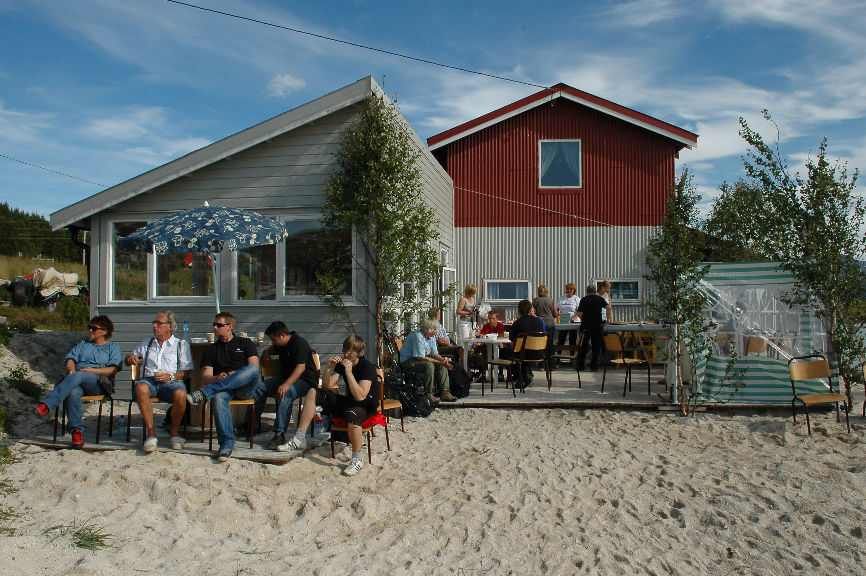 Tussøy båtmotormuseum. Fra Kulturminnedagen august 2011.